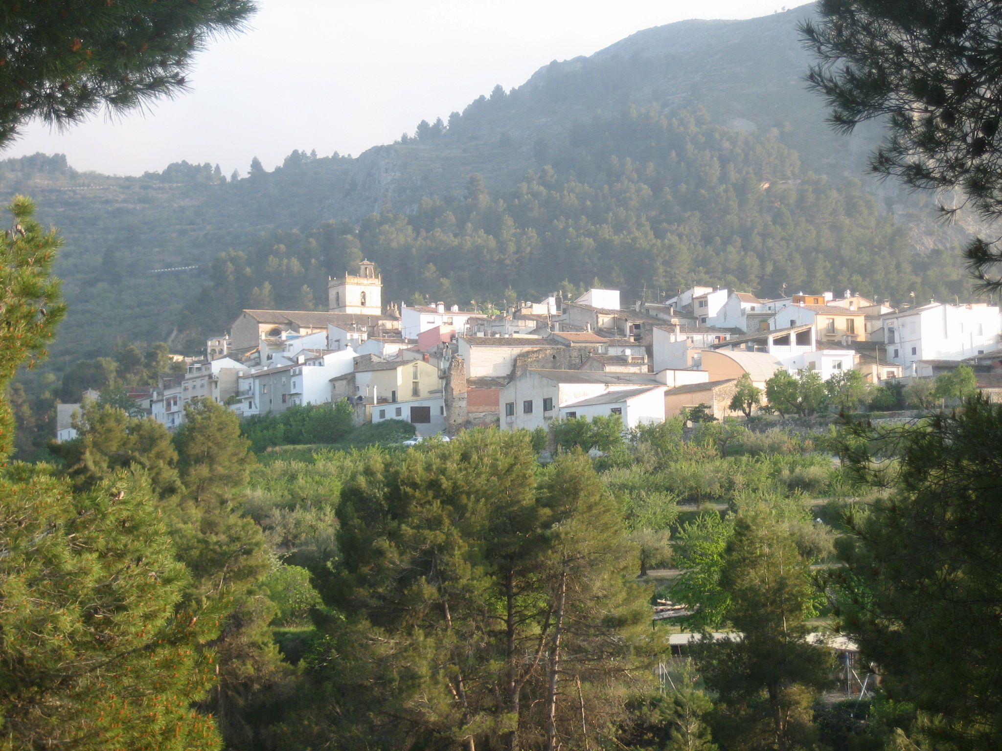 Vista de la localidad de Penáguila (Alicante, España). Fotografía realizada por Rodriguillo el 13/04/2006.